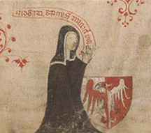 Breviář Kunhuty z Kolovrat - Kunhuta z Kolovrat